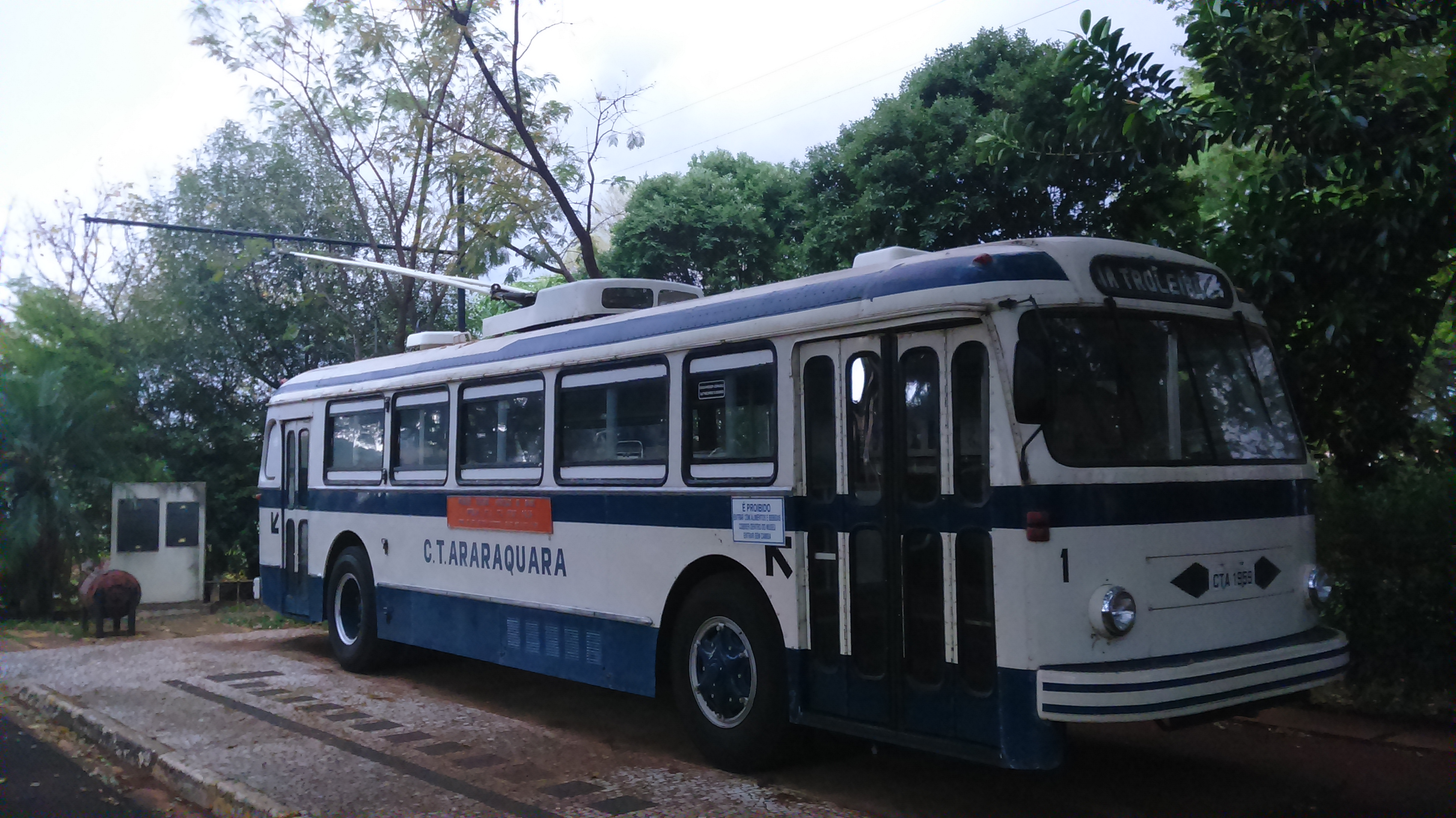 tróleibus da CTA